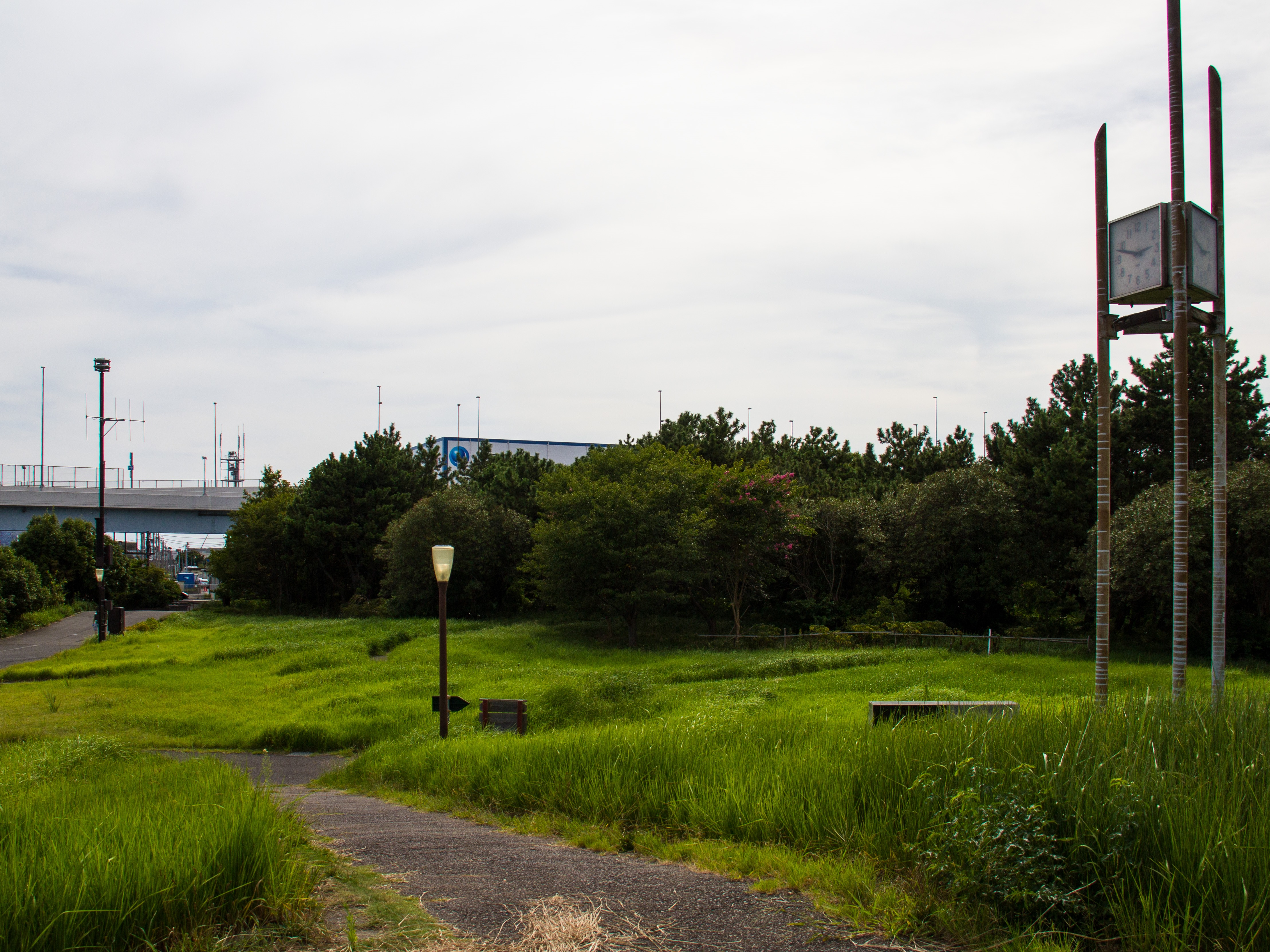 浮島町公園広場